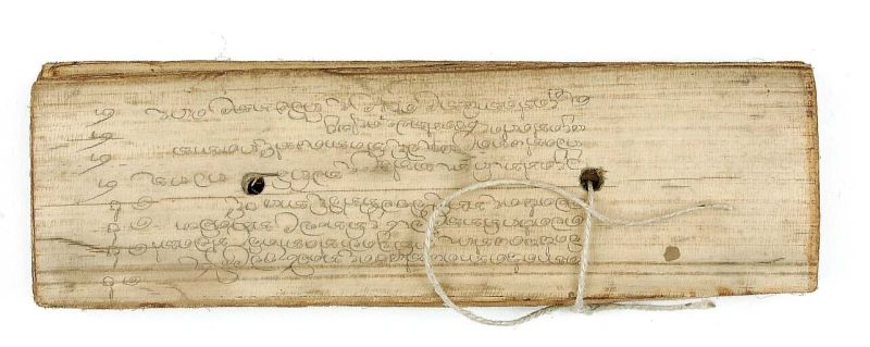 Lontarhandschrift. Magische tekst in het Balinees en tekeningen, formules en diagrammen voor het bepalen van geschikte dagen in de landbouw, op 25 vellen lontar met houten schutbladen Unknown language: Kropak Cakepan